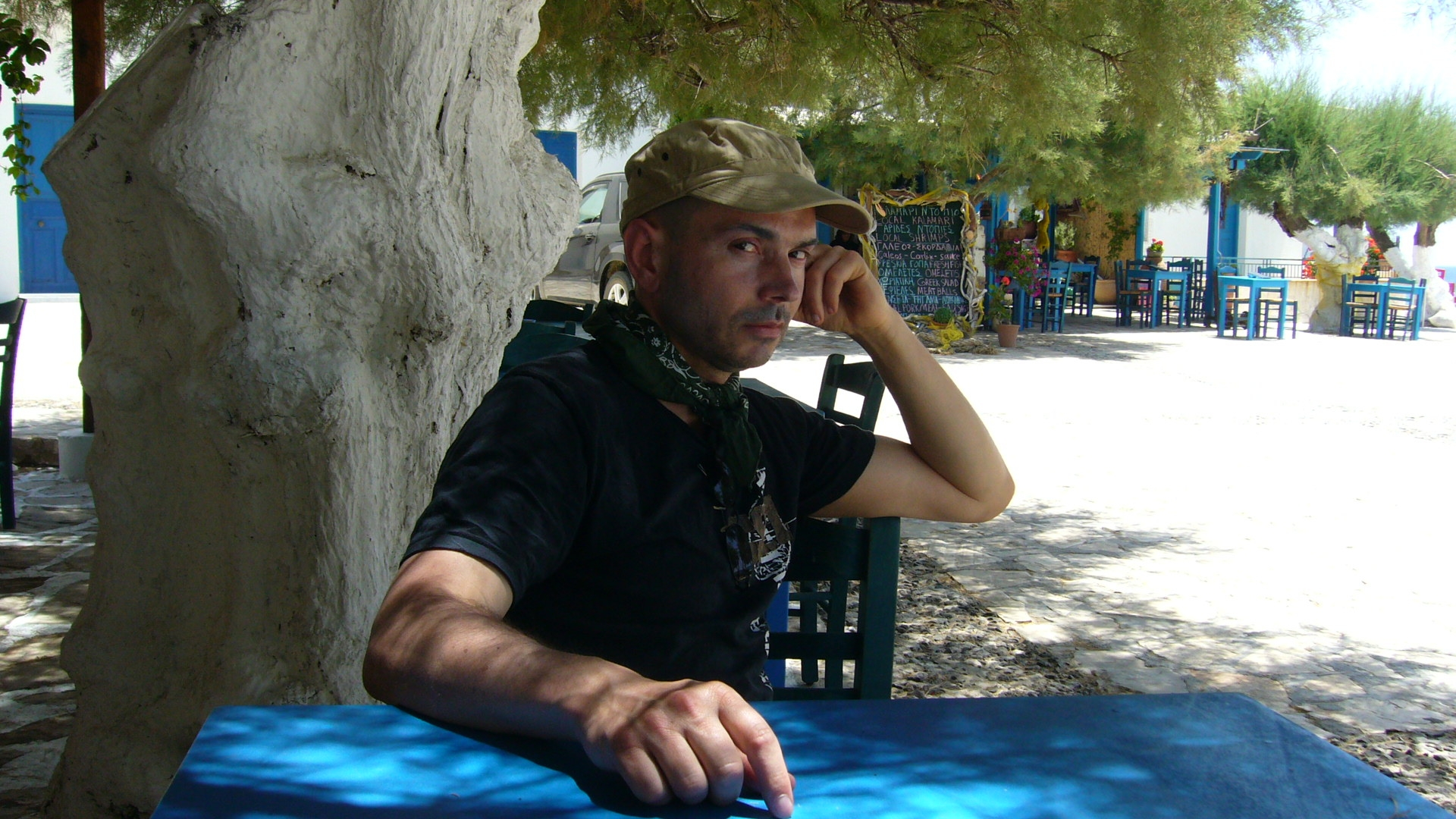 Eric Boisset Milos 2010